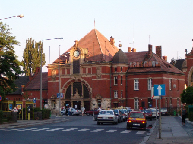 Opole, ul. Krakowska - zespół dworca PKP: budynek główny z przejściem podziemnym, pocz. XX